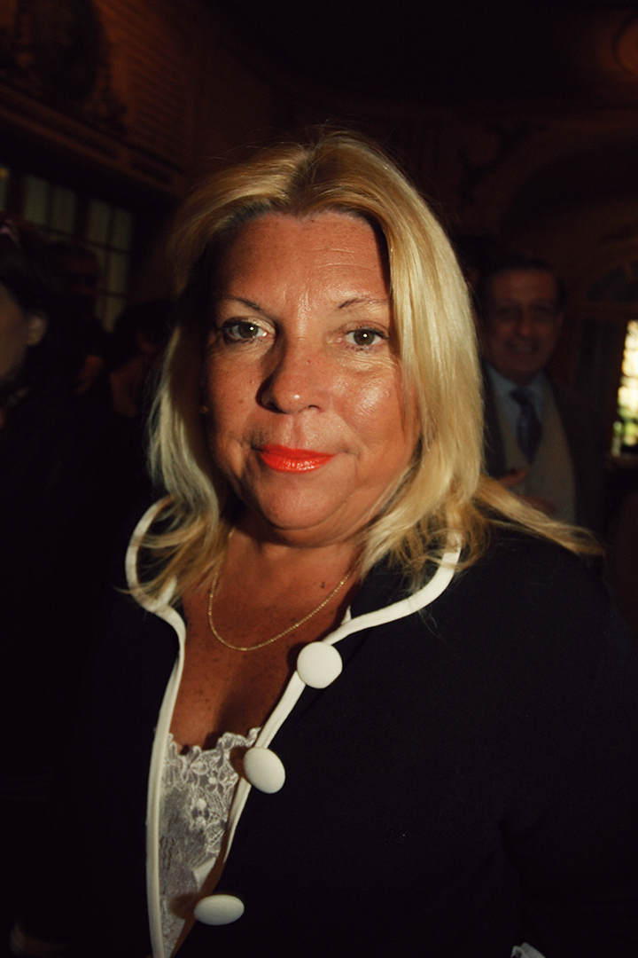 Elisa carrió asiste a una conferencia de prensa en el marco de las elecciones del año 2007.